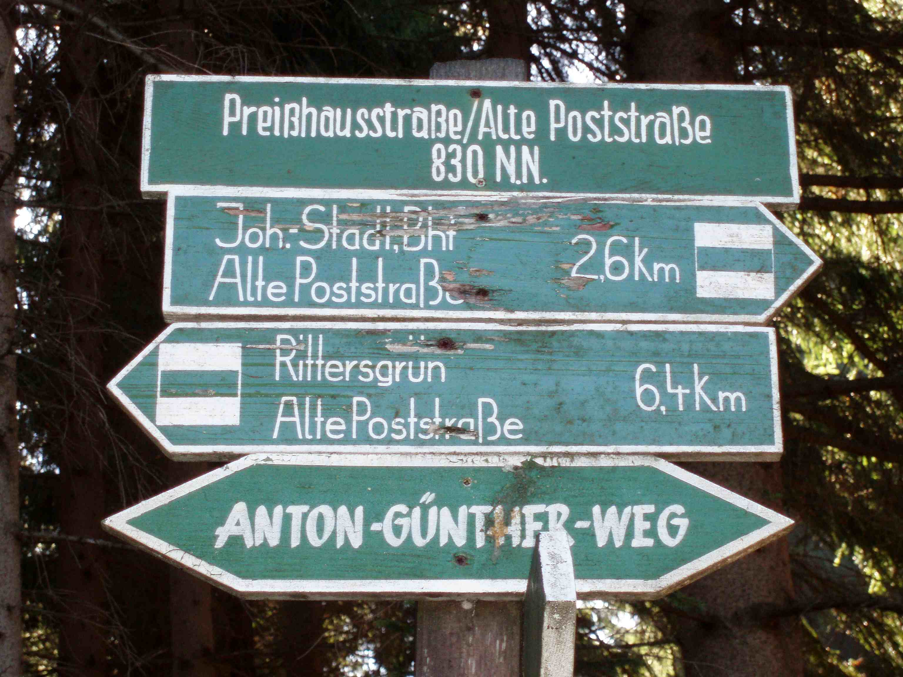 Wegweiser Anton-Günther-Weg